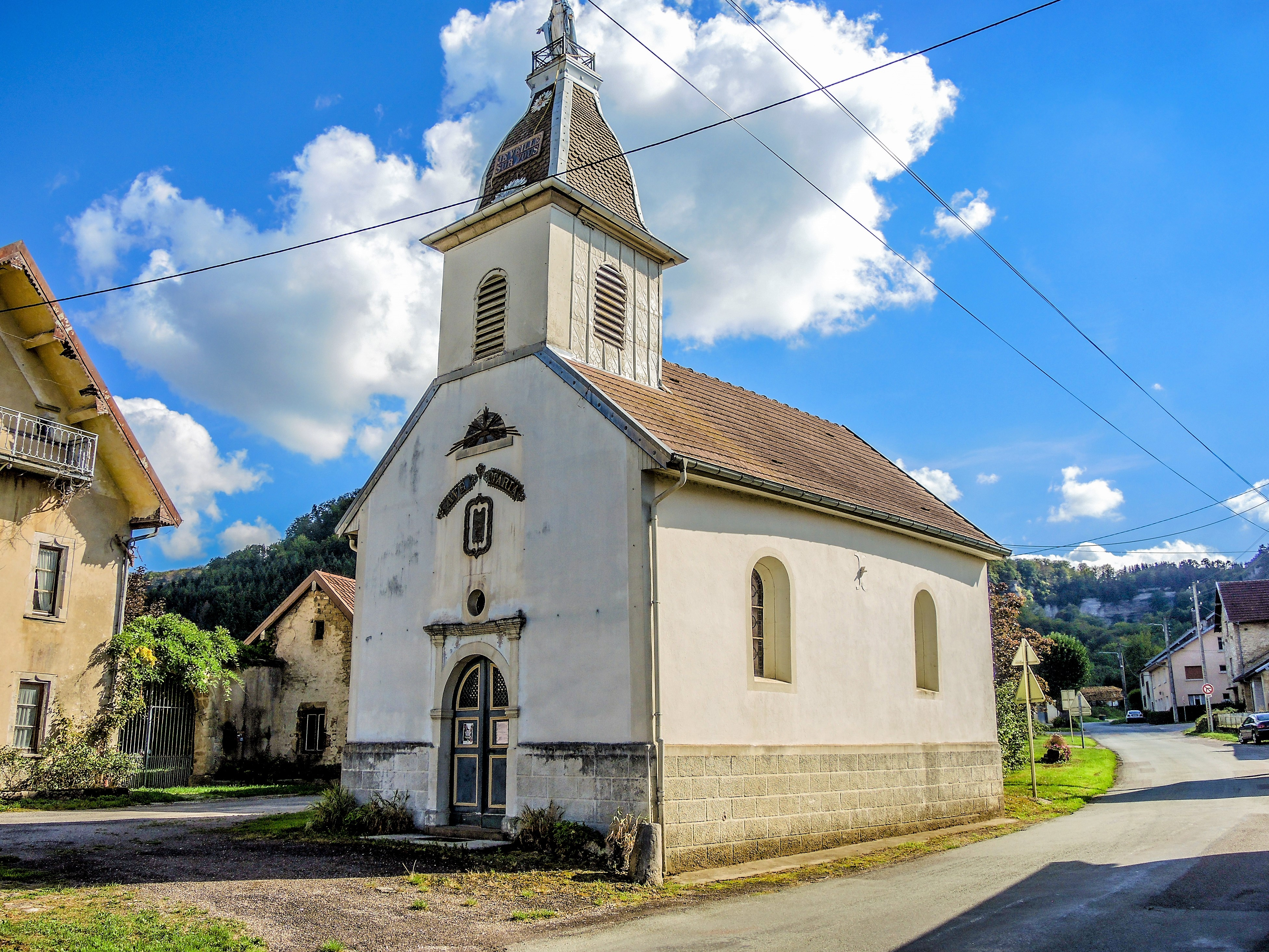 Chapelle de la Vierge Marie. Sancey-le-Grand. Doubs